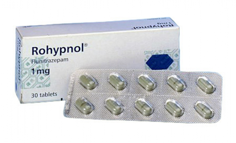 Bildet ovenfor viser preparatet Rohypnol (Flunitrazepam)